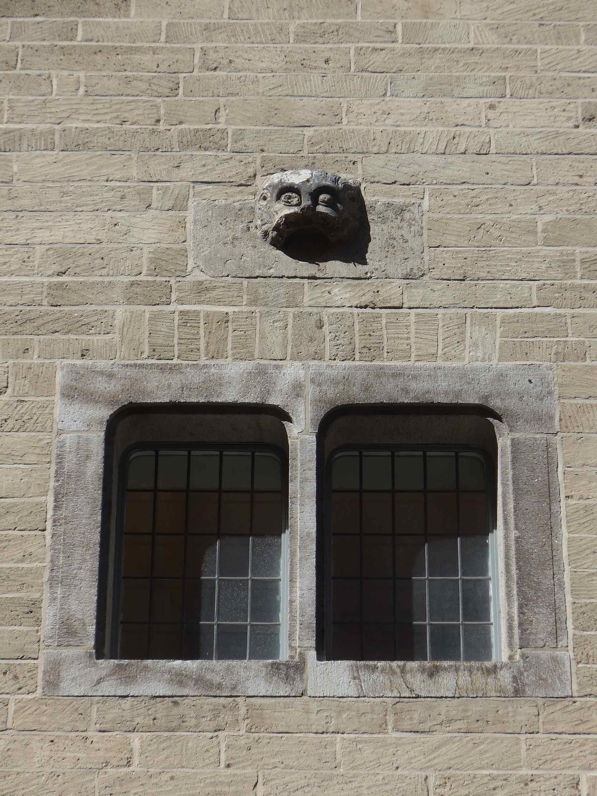 Haus Saaleck, Am Hof 50, Hausfassade Unter Taschenmacher This is a photograph of an architectural monument.